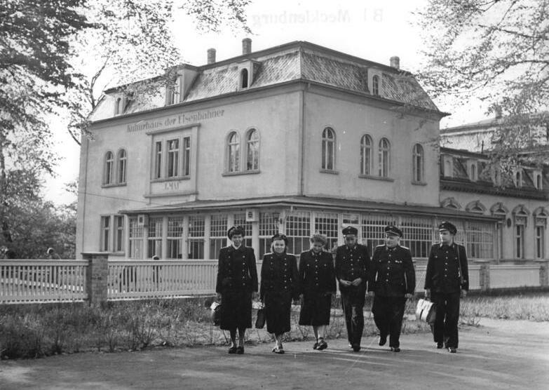 Greifswald, Kulturhaus der Eisenbahner Zentralbild Klein 4.6.1955 Zum "Tag des Eisenbahners" am 12.6.1955 Kulturhaus der Eisenbahner "1.Mai" in Greifswald Das Kulturhaus der Eisenbahner "1.Mai" in Greifswald ist zum Mittelpunkt des kulturellen Lebens der Eisenbahner Greifswalds und Umgebung geworden. In ihren freien Stunden treffen sich die Eisenbahner in ihrem Kulturhaus, um in Interessengemeinschaften zu arbeiten, ein gutes Buch zu lesen oder auch, um gesellig beisammen zu sein. UBz: Aussenansicht des Kulturhauses.